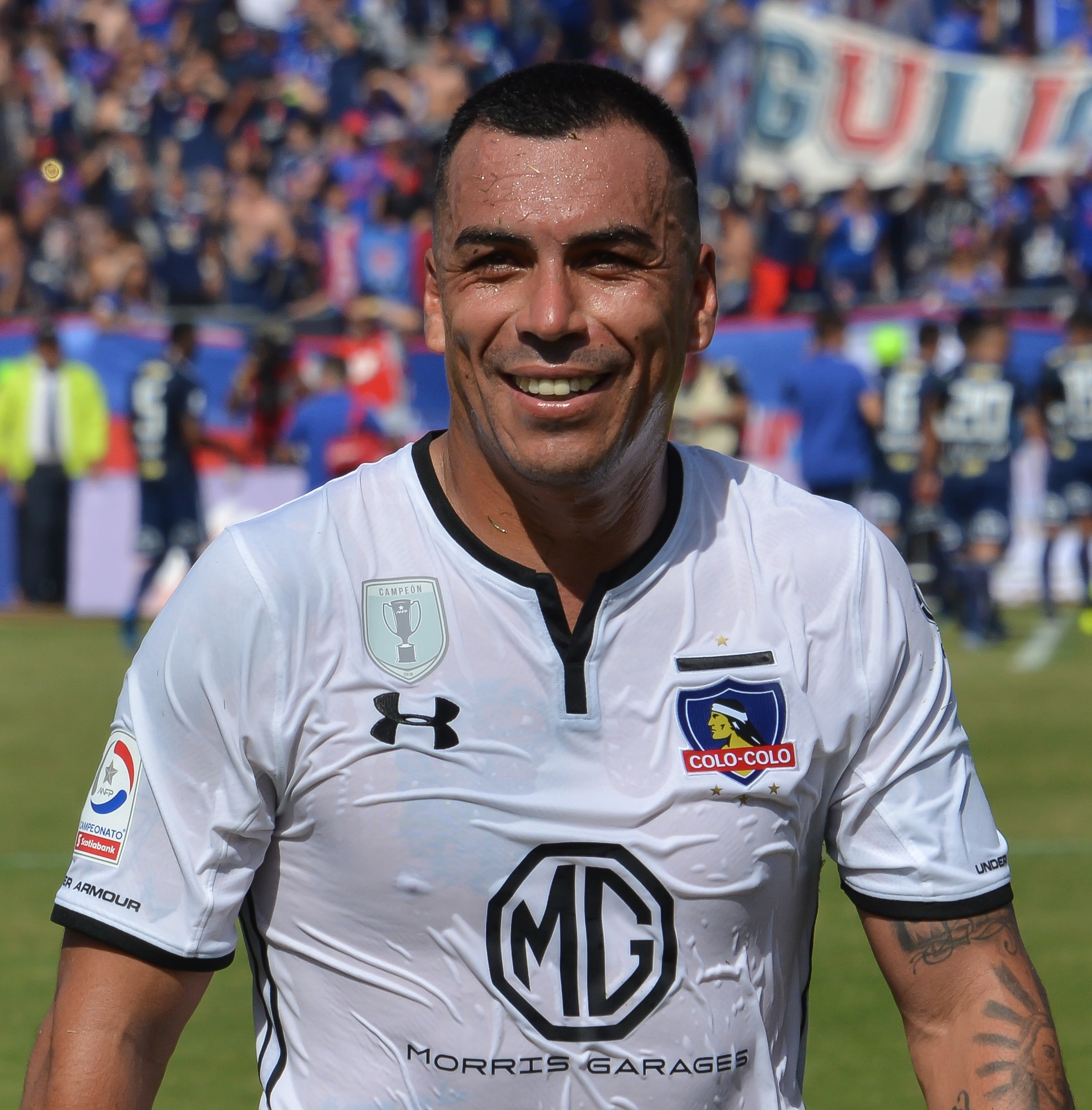 Universidad de Chile v Colo-Colo, Estadio Nacional, Santiago, Chile.